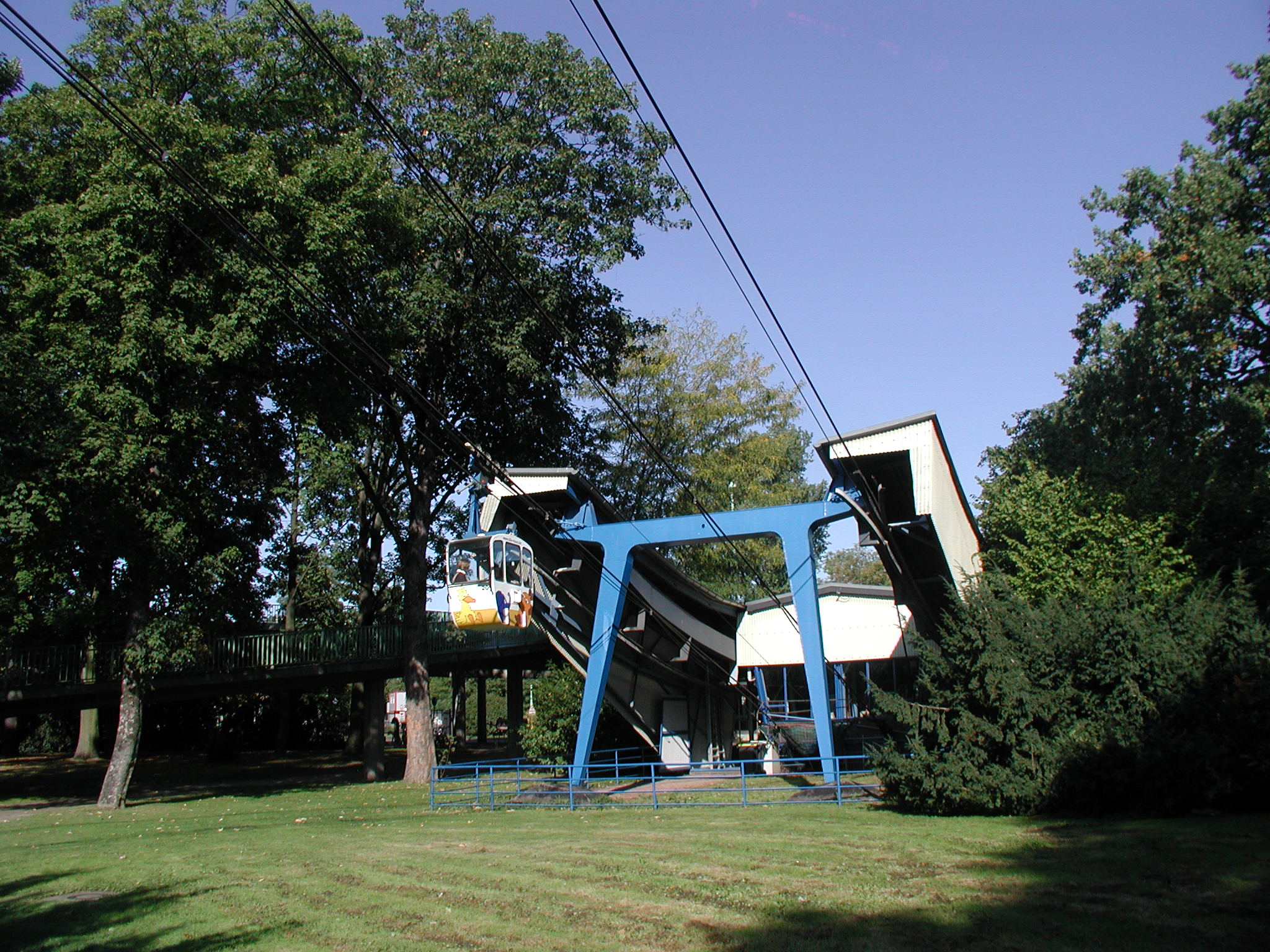 Köln, Rheinseilbahn Station Riehl